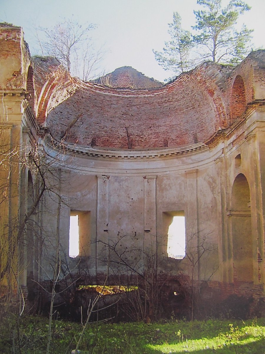 Апсіда касцёла Святых Анёлаў-Ахоўнікаў у вёсцы Канічы Касцюковіцкага раёна Магілёўскай вобласці Беларусі